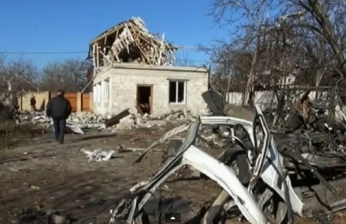 В ефірі програми "Подробиці" розповiли про обстрiли у Донецьку.